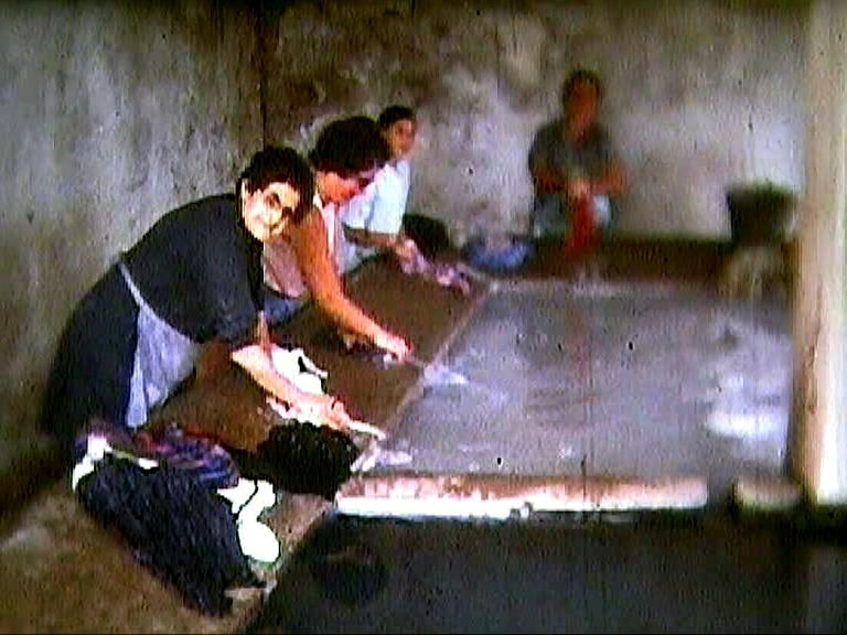 Lavaderos públicos de Campos de Arenosos (fotograma capturado de Super 8)